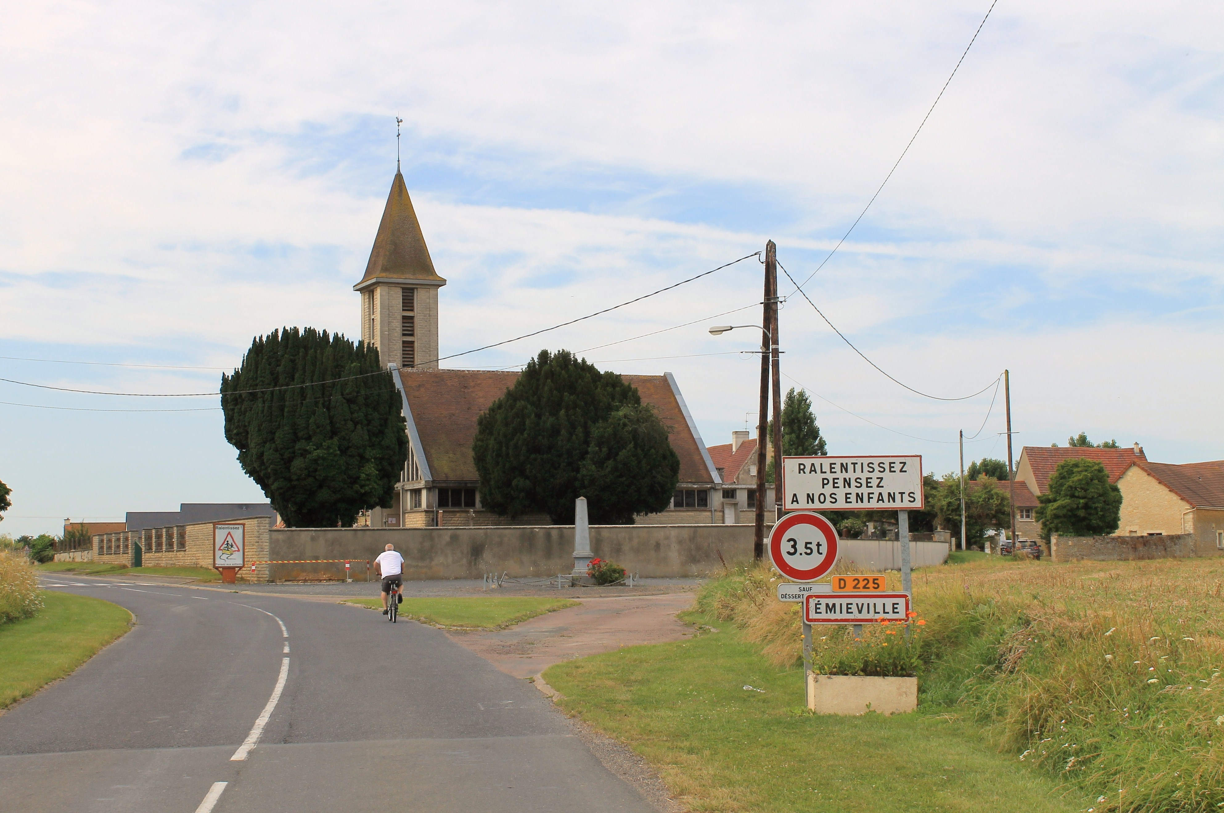 Émiéville et église Notre-Dame (Calvados)